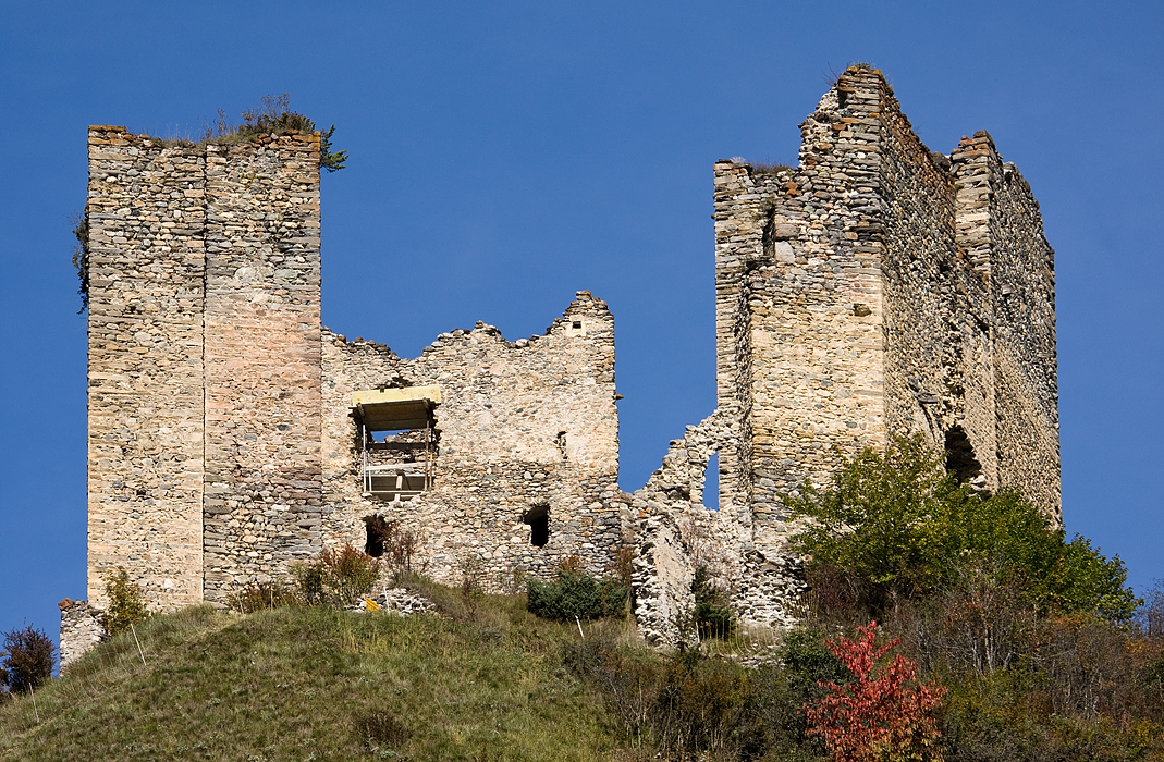 Die Burgruine Tschanüff in Ramosch im Unterengadin